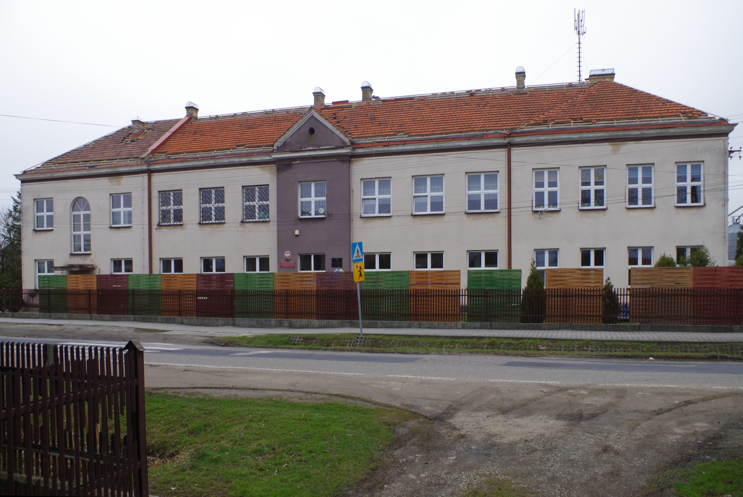 Szkoła w Majkowicach